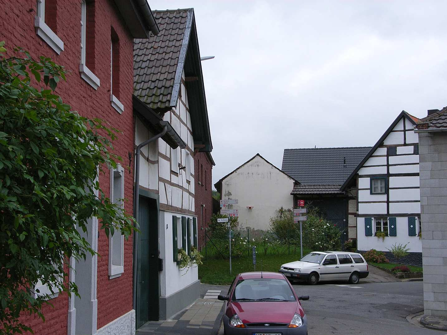 Hückelhoven-Doverhahn, Germany